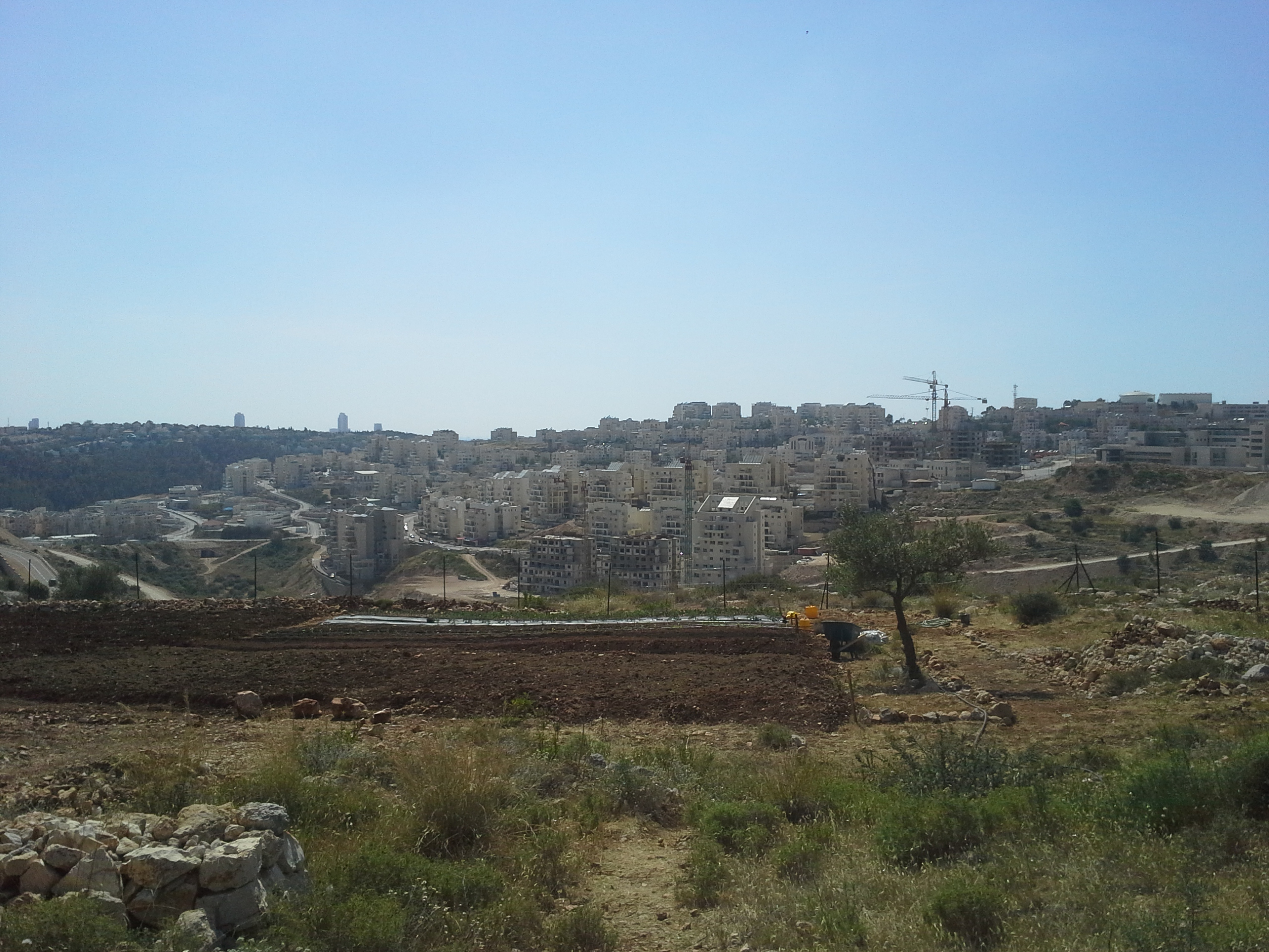 مستوطنة موديعين عيليت، مستوطنة اسرائيلية في الضفة الغربية قريب من قرية بلعين